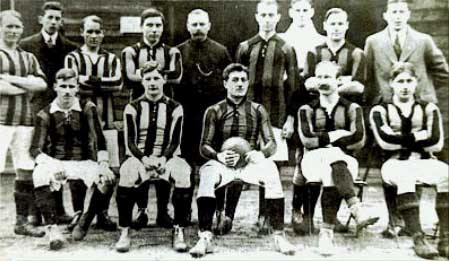 Elftalfoto uit 1914, vlak voor mislopen Nederlands kampioenschap